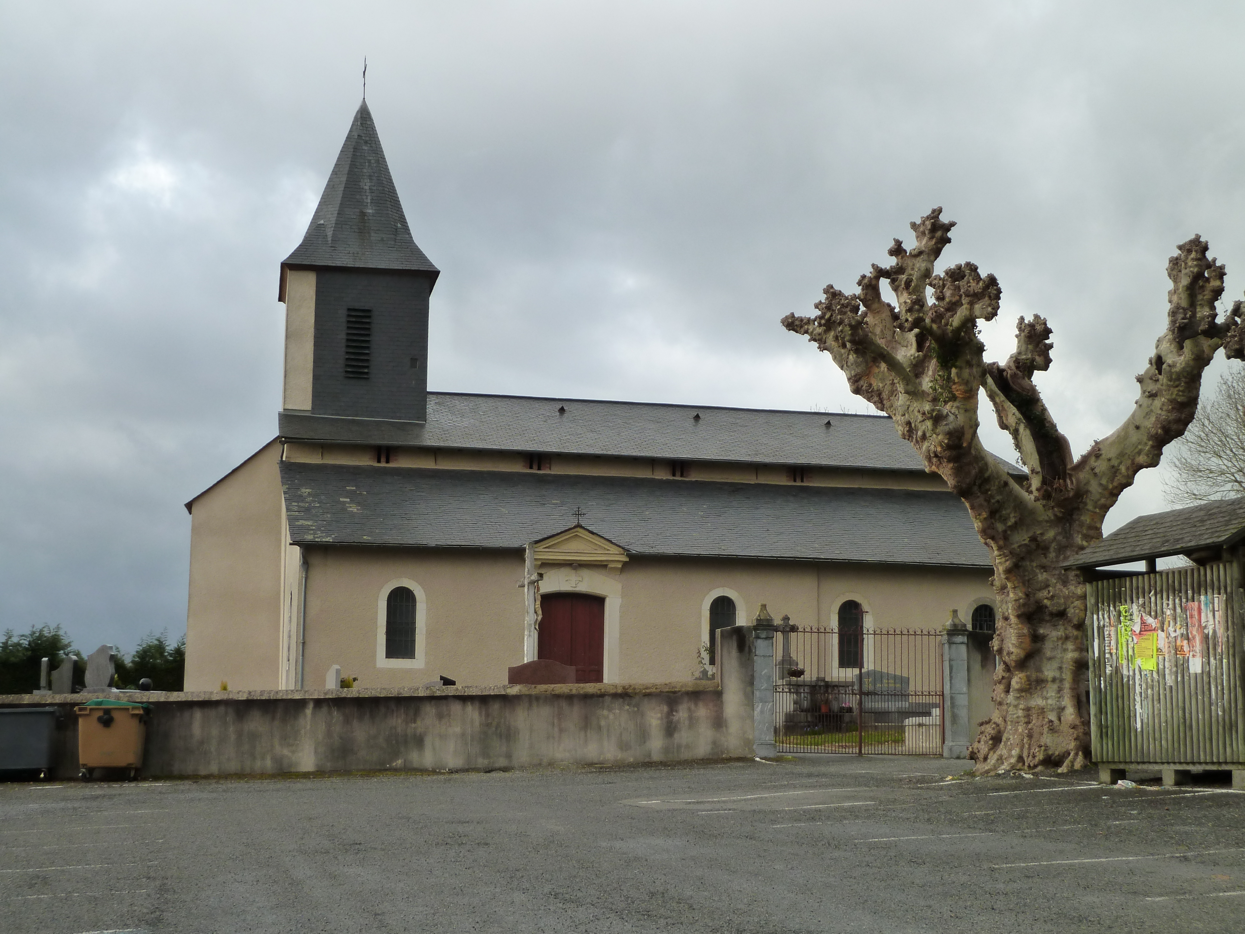 Eglise de Lourenties